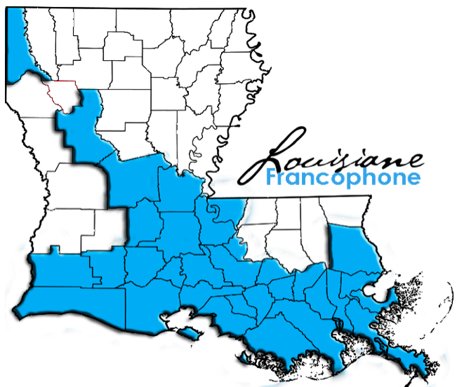 Paroisses où vivent les francophones en Louisiane.